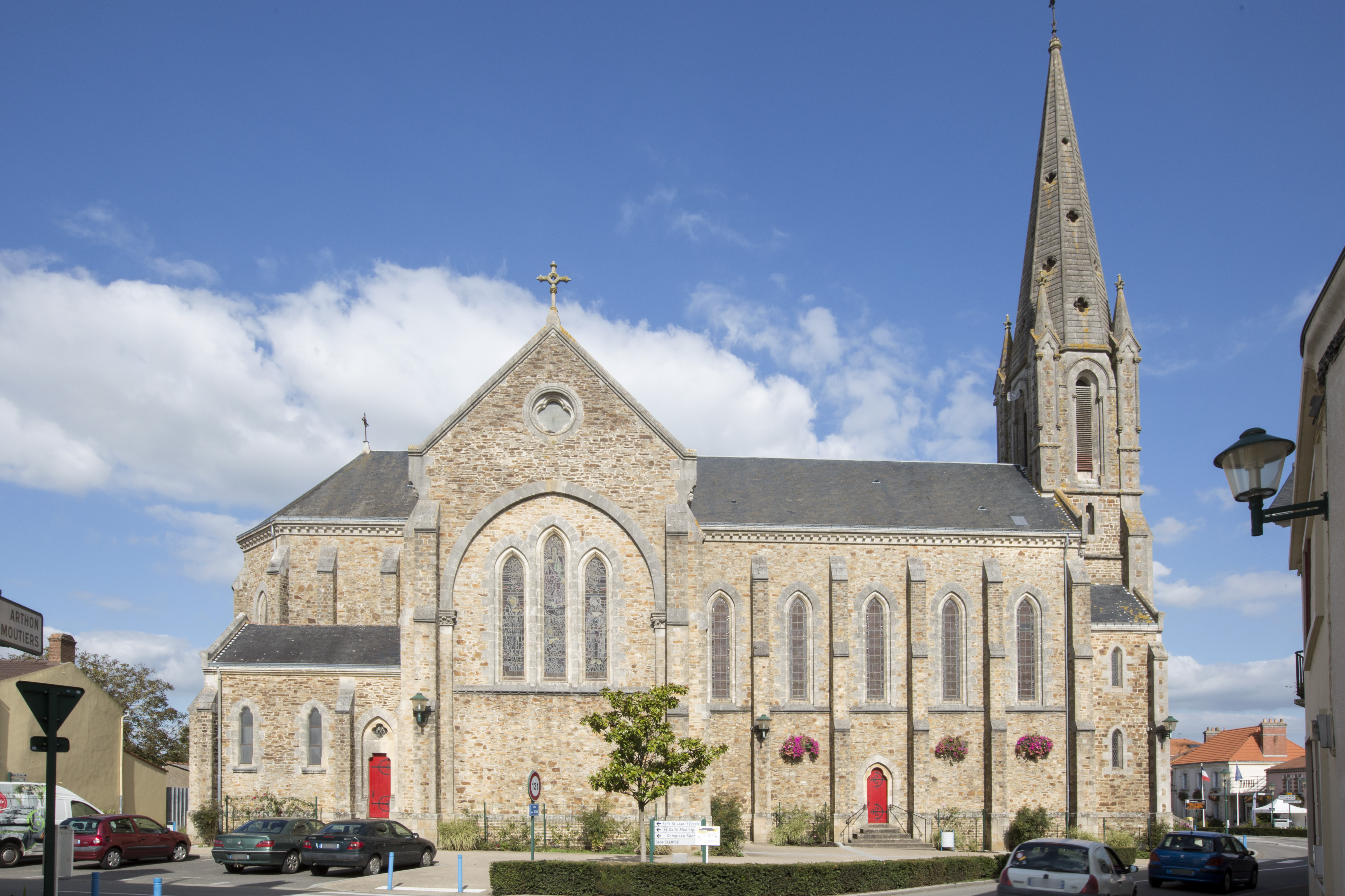 Reconstitution d'une ancienne carte postale représentant l'Eglise de Chéméré